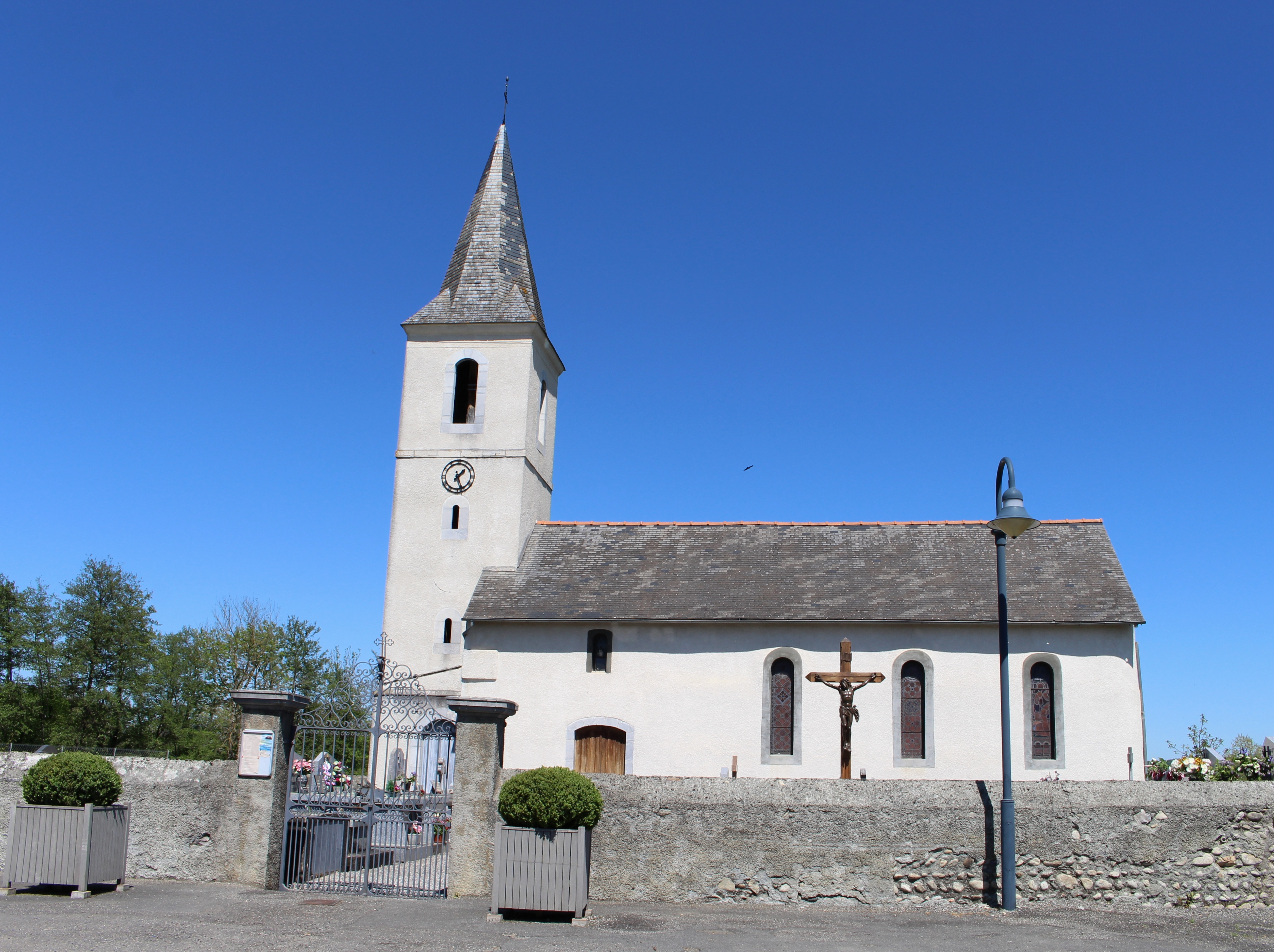 Église Saint-Pierre d'Allier (Hautes-Pyrénées)